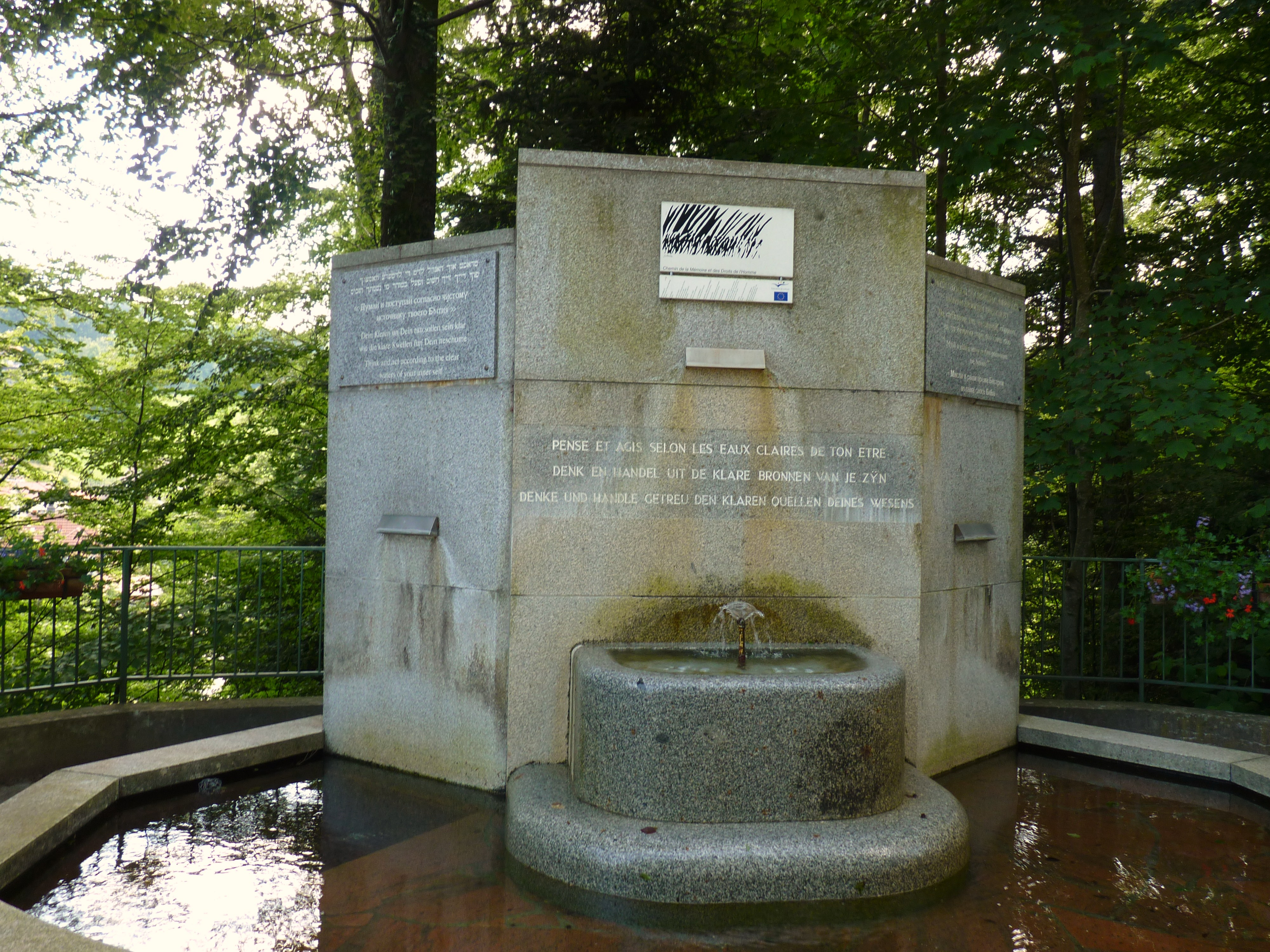 Fontaine Haïdi Hautval